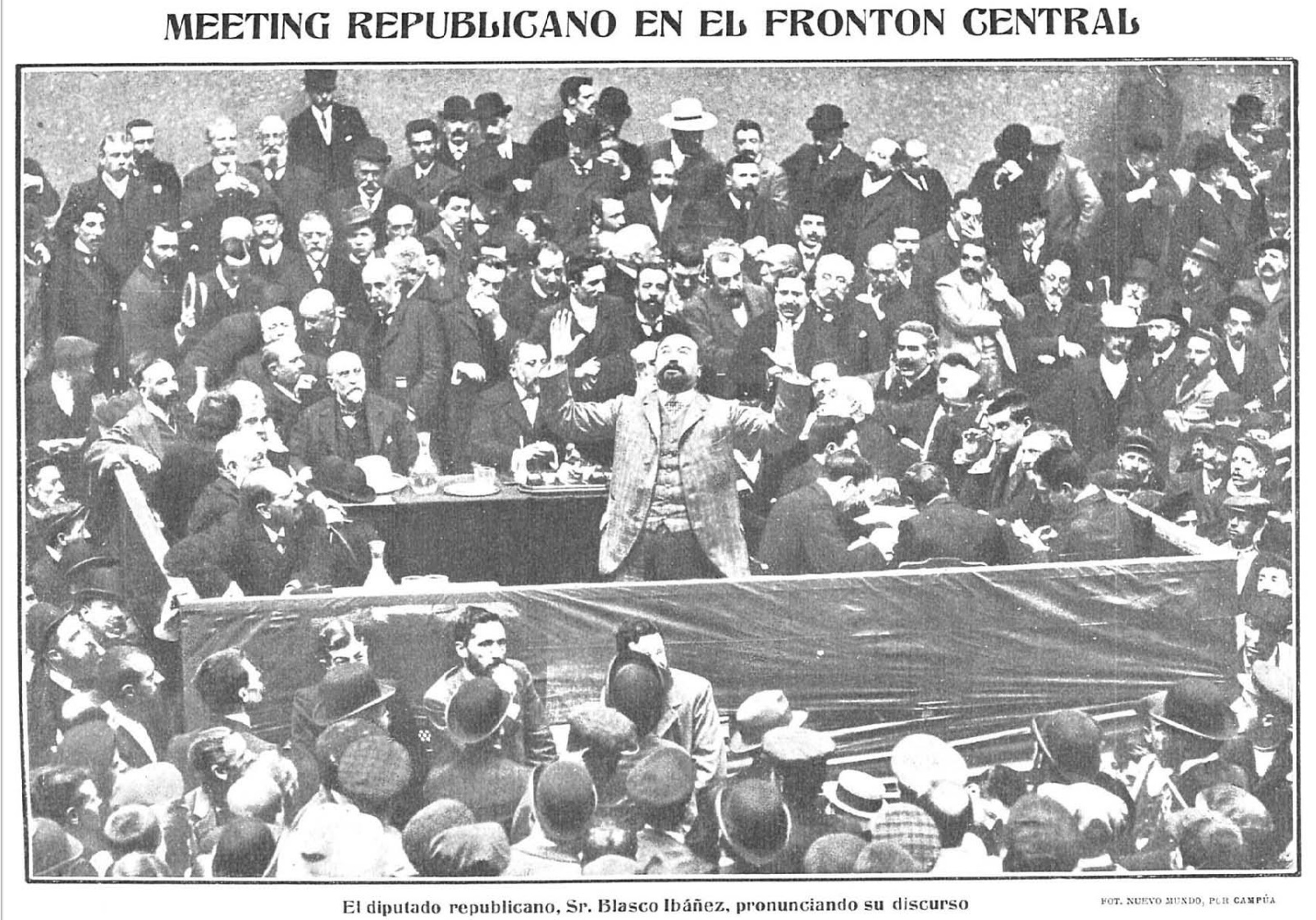 Meeting republicano en el fronton central. (FOT. NUEVO MUNDO, POR CAMPÚA).A propuesta de su junta municipal de Madrid, el partido republicano acordón, recientemente, una gran campaña de propaganda contra el gobierno, y de ella puede considerarse como acto inicial el meeting celebrado el domingo último en el Frontón Central de esta corte. El público llenaba por completo los palcos y gradas y la mitad de la cancha. Presidió el Sr. Catalina, jefe de la citada junta local, y usaron sucesivamente la palabra, después del presidente, los señores Morayta, Blasco Ibáñez, Labra y Salmerón, que arrancaron nutridos aplausos de la concurrencia.